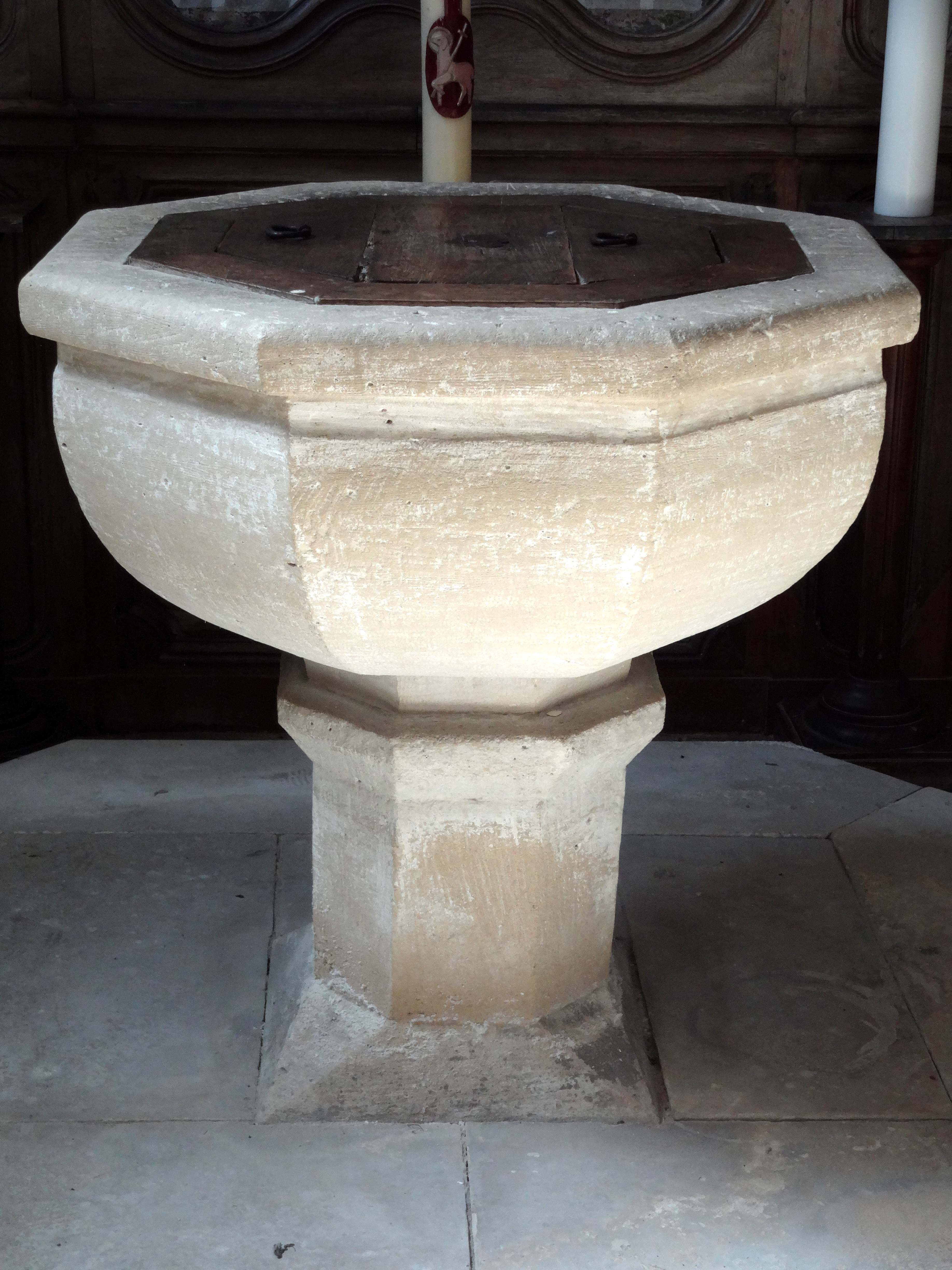 Mobilier de l'église - voir titre.